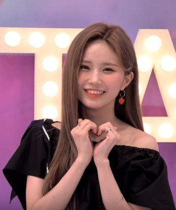 11일 오전 서울 상암동 tbs 오픈스튜디오에서 공개녹화로 ‘tbs 팩트인스타 - ‘프로미스나인’편이 진행됐다.